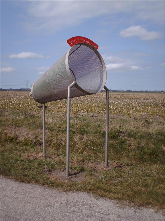 Blikvanger bij Heerenveen (trash container)